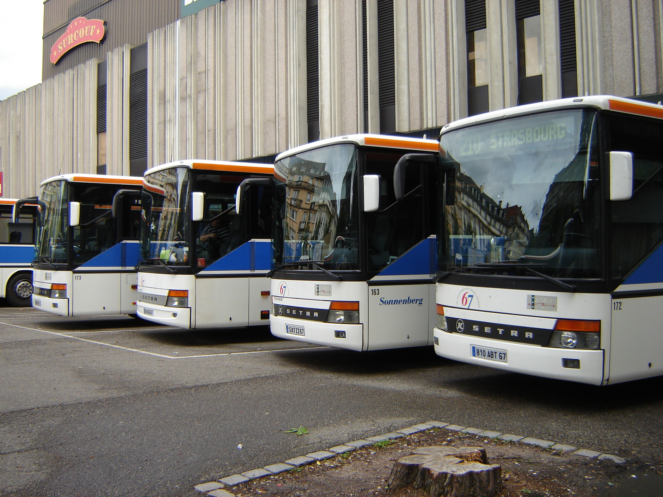 Des S315UL du réseau interurbain du Bas-Rhin